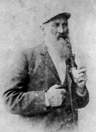 Johannes Mück (1831-1919), deutsch-dänischer Maler